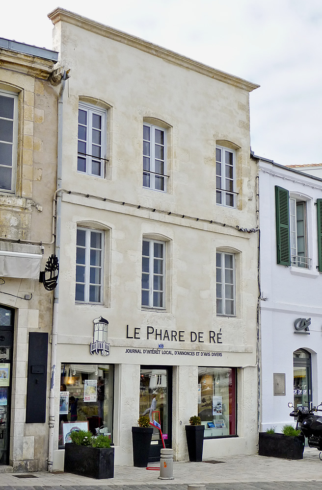 Rédaction du journal le Phare de Ré à Saint-Martin-de-ré - île de Ré - Charente-Maritime Photo issue de ma banque d'images : Alain - Pep.per 18 septembre 2006 à 13:22 (CEST)